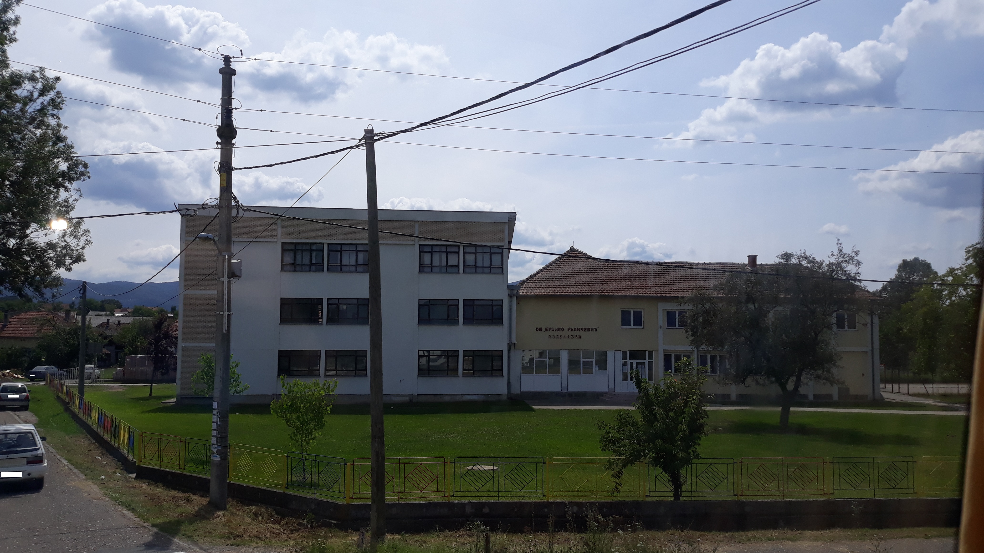 Основна школа у Подунавцима